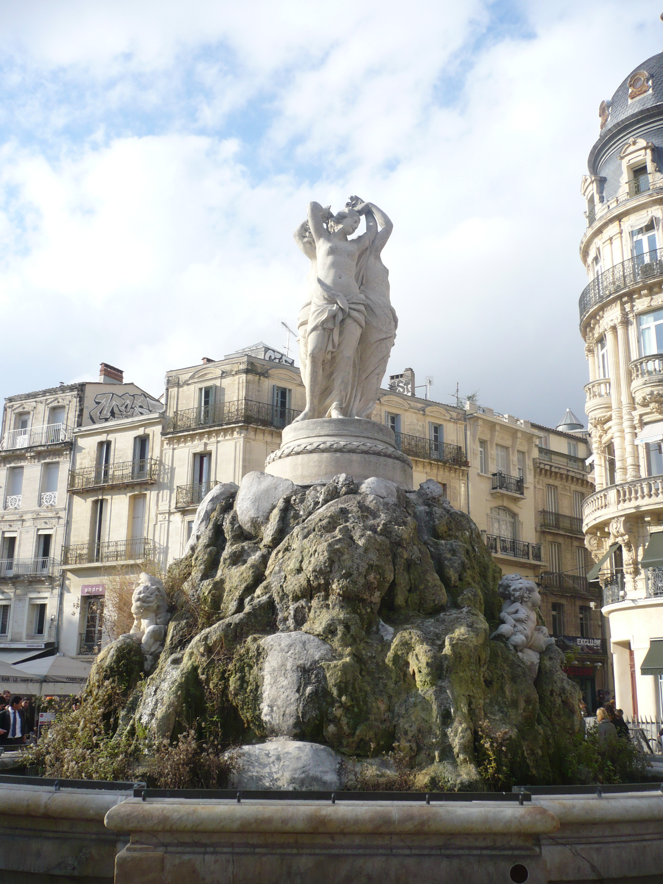 La fontaine des Trois Grâces est un monument historique classé situé place de la Comédie, à Montpellier, dans l'Hérault.